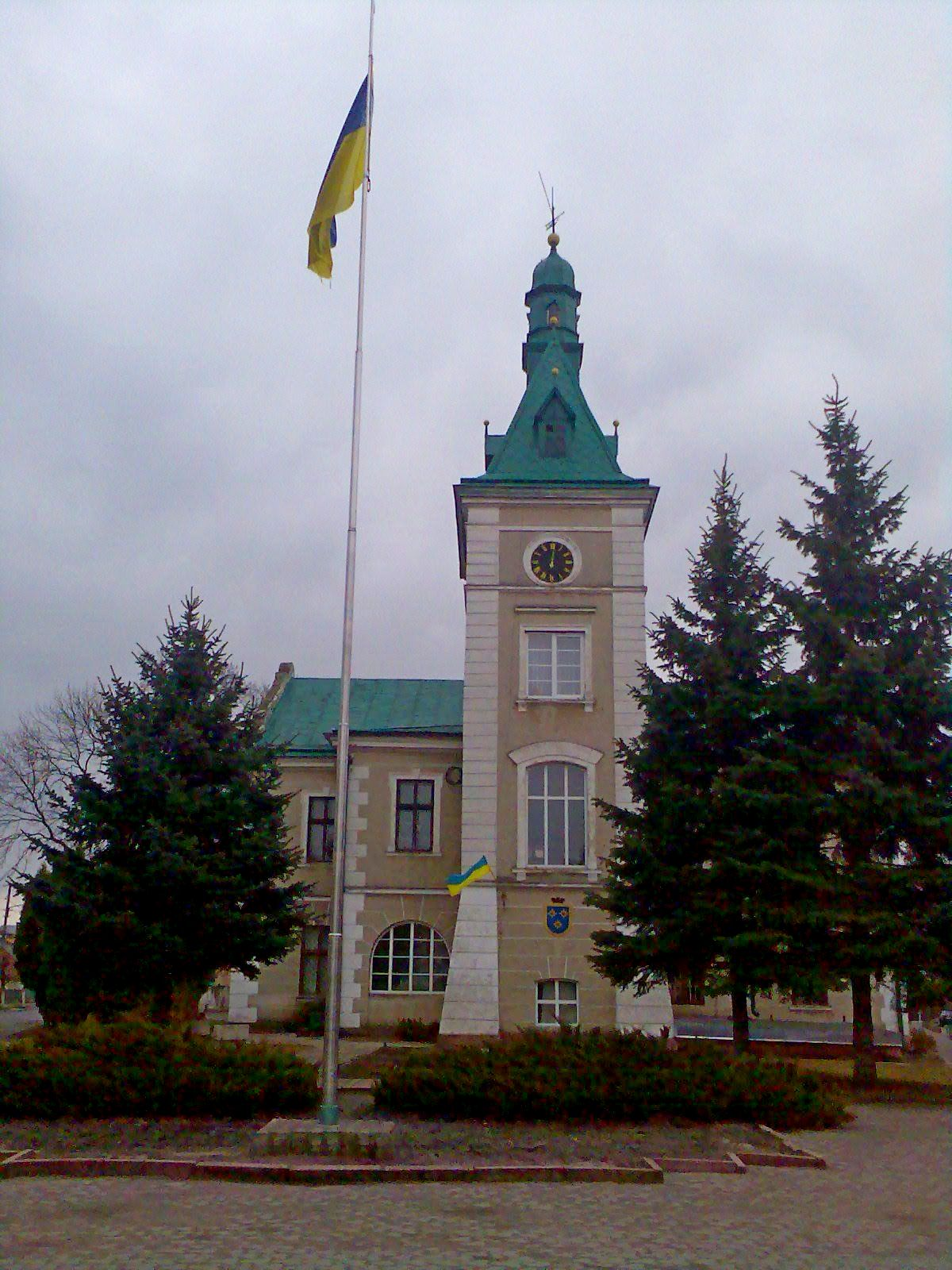 Ратуша (мур.), Кам'янка-Бузька, вул. Шевченка, 2